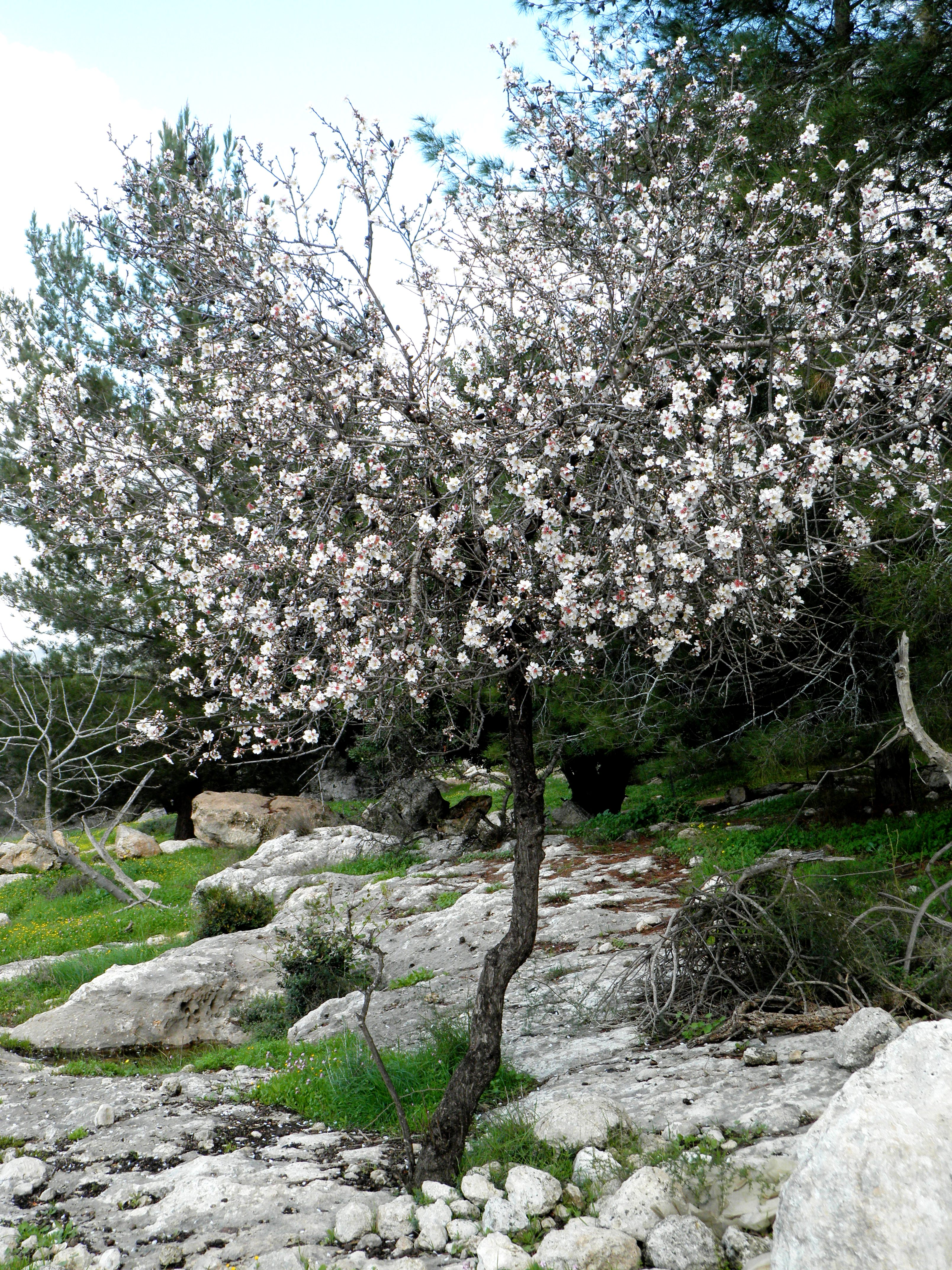 Yarkon Cemetery עץ שקדיה בדיר-אבאן